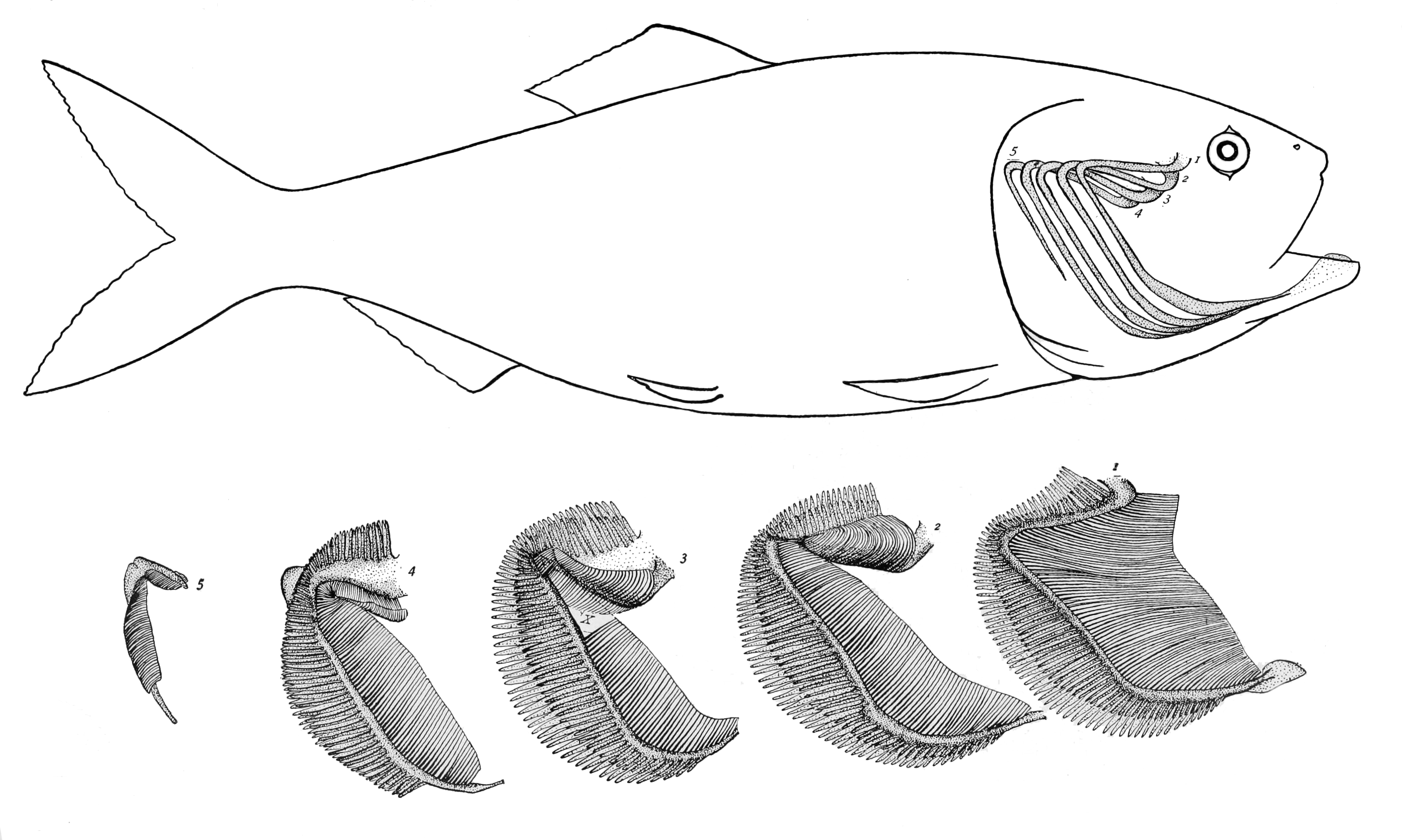 Gills